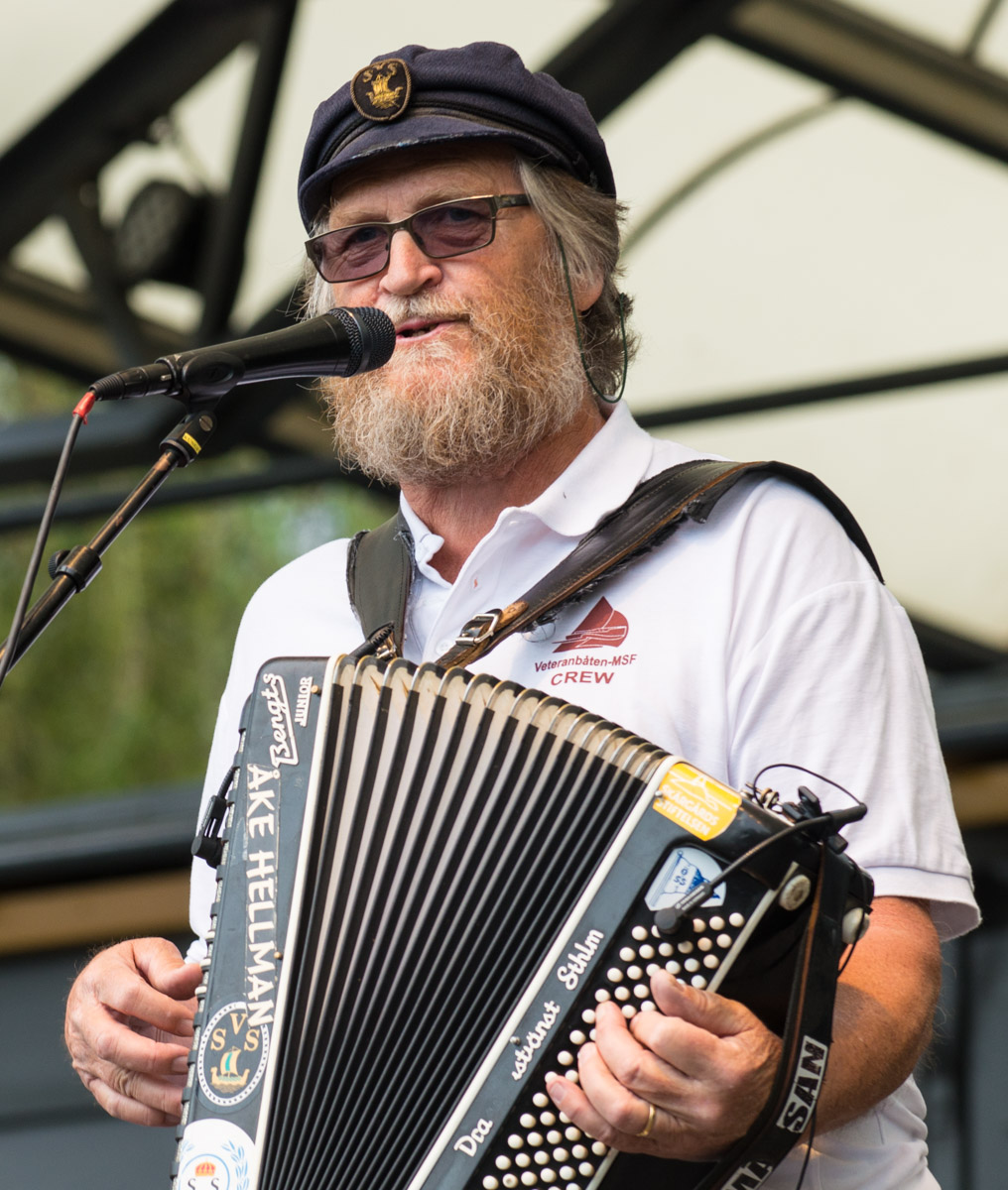 Åke Hellman i Kungsträdgården i Stockholm den 23 juli 2015.